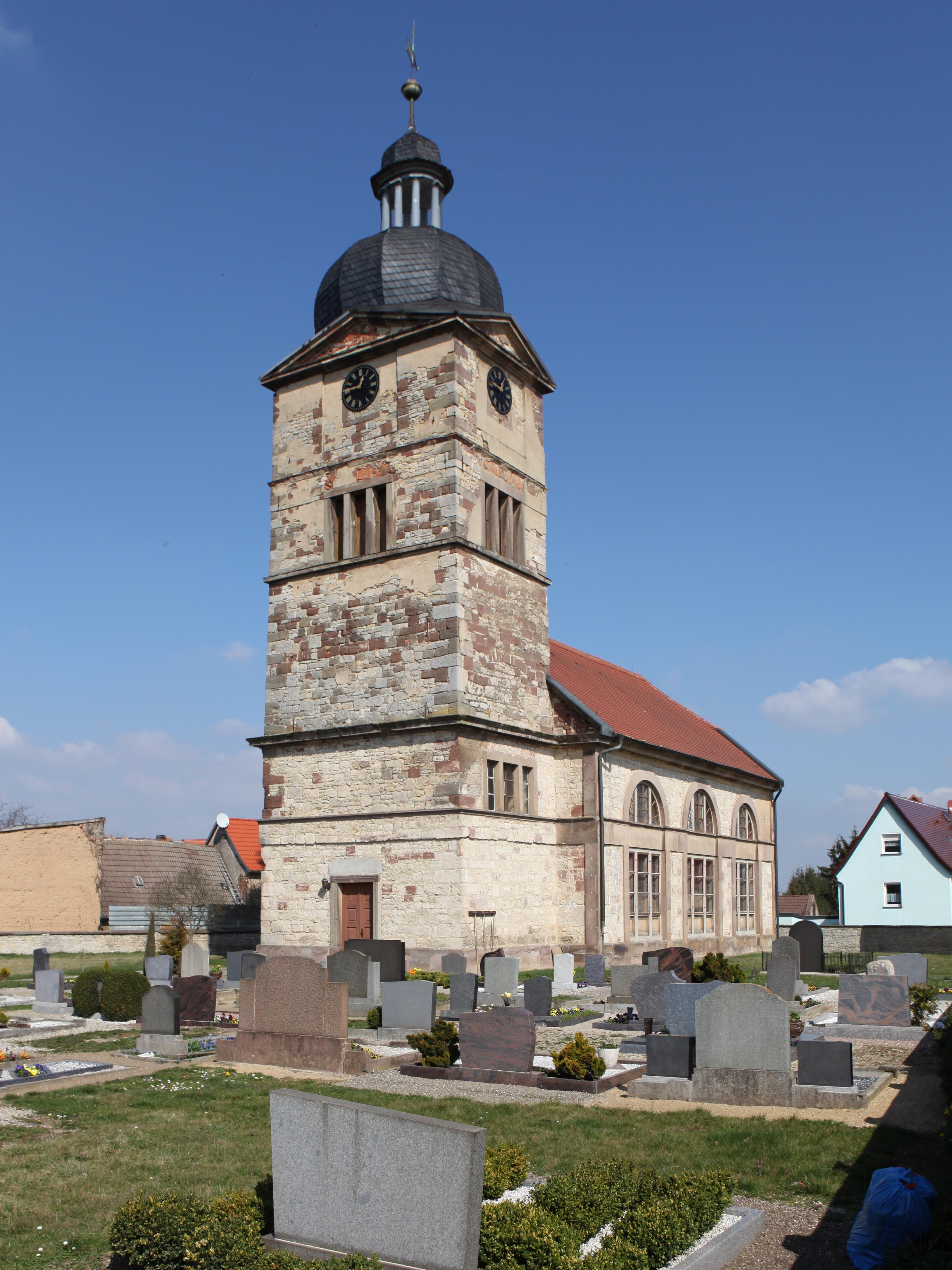 Evangelische Kirche in Kalzendorf, Ortsteil von Steigra in Sachsen-Anhalt